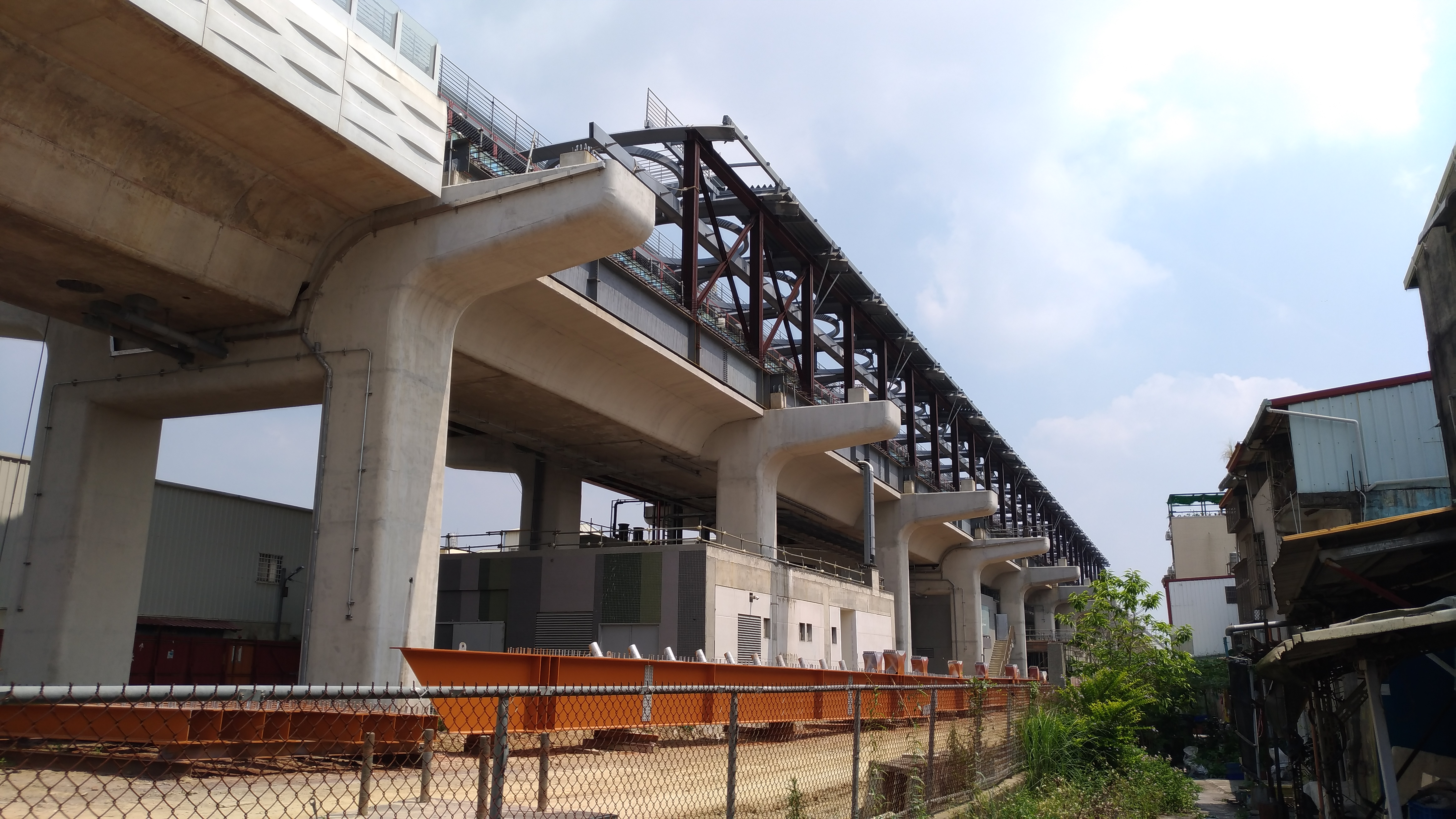 頭家厝車站2017年5月工程